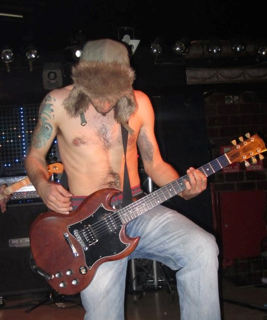 Ignacio Santos guitarra